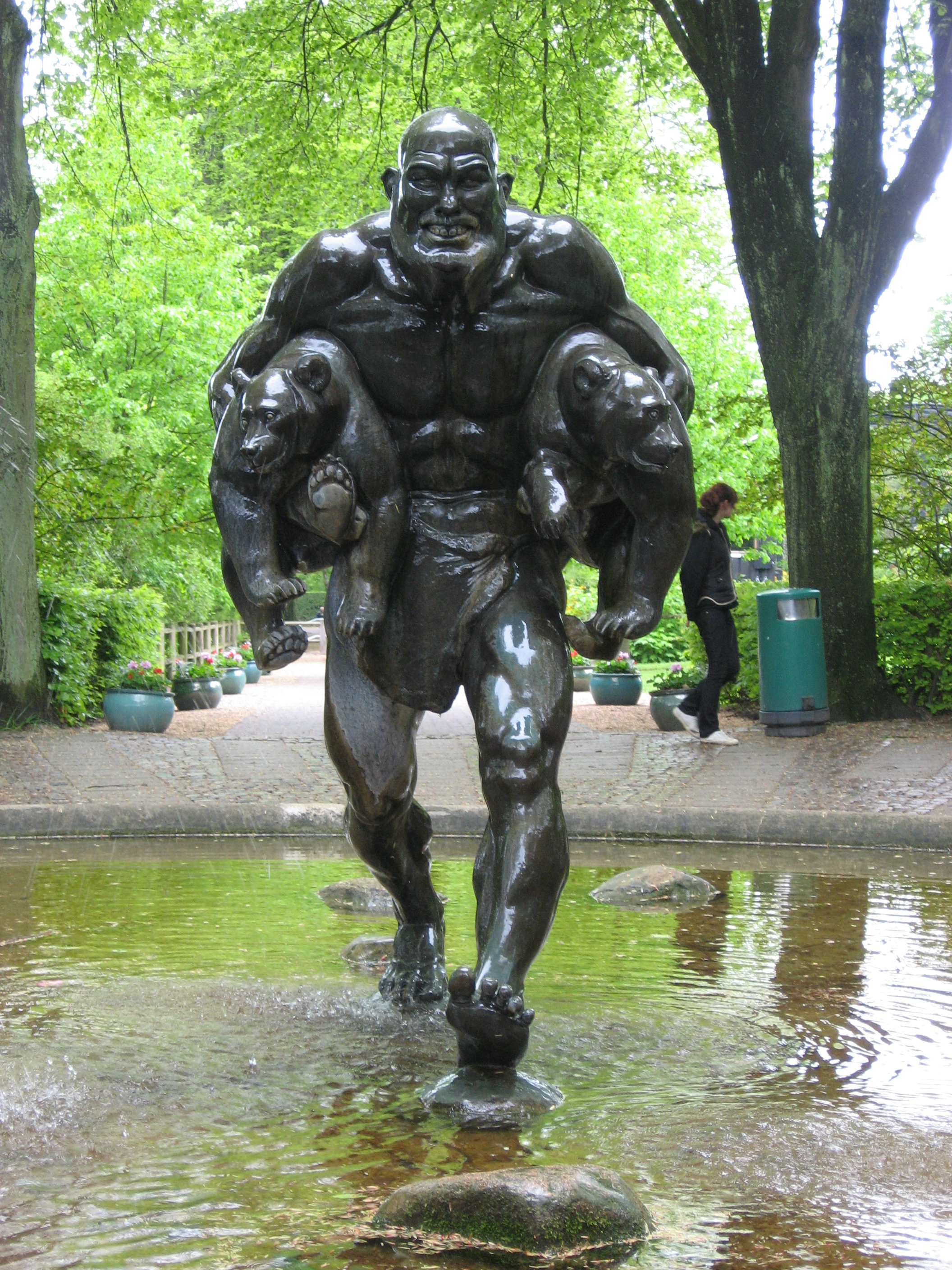 Sculpture in Aalborg Zoo, Ålborg, Denmark. Det gode kup by C.J. Bonnesen, 1925.